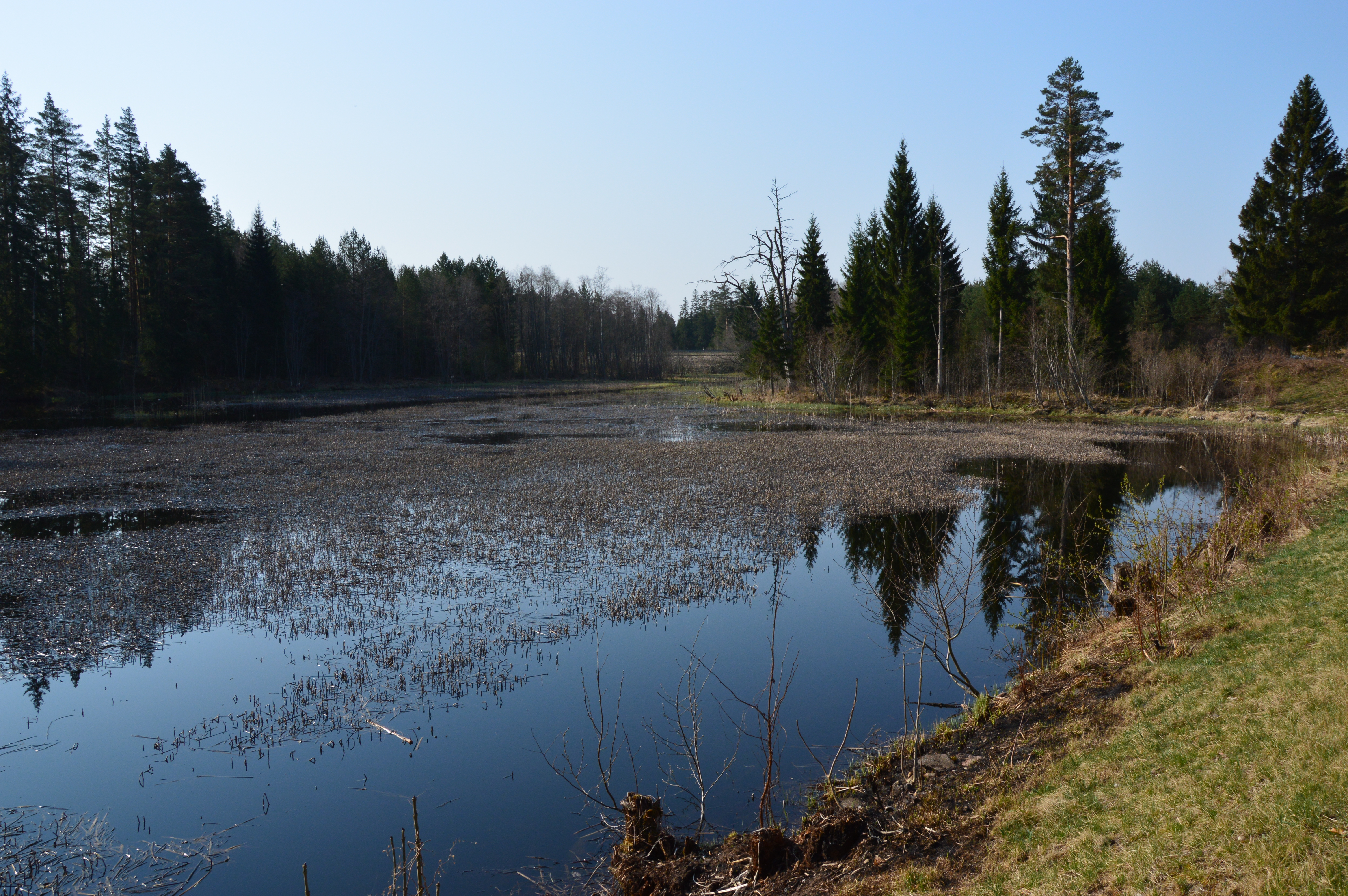 Rõuge jõgi Kaku külas